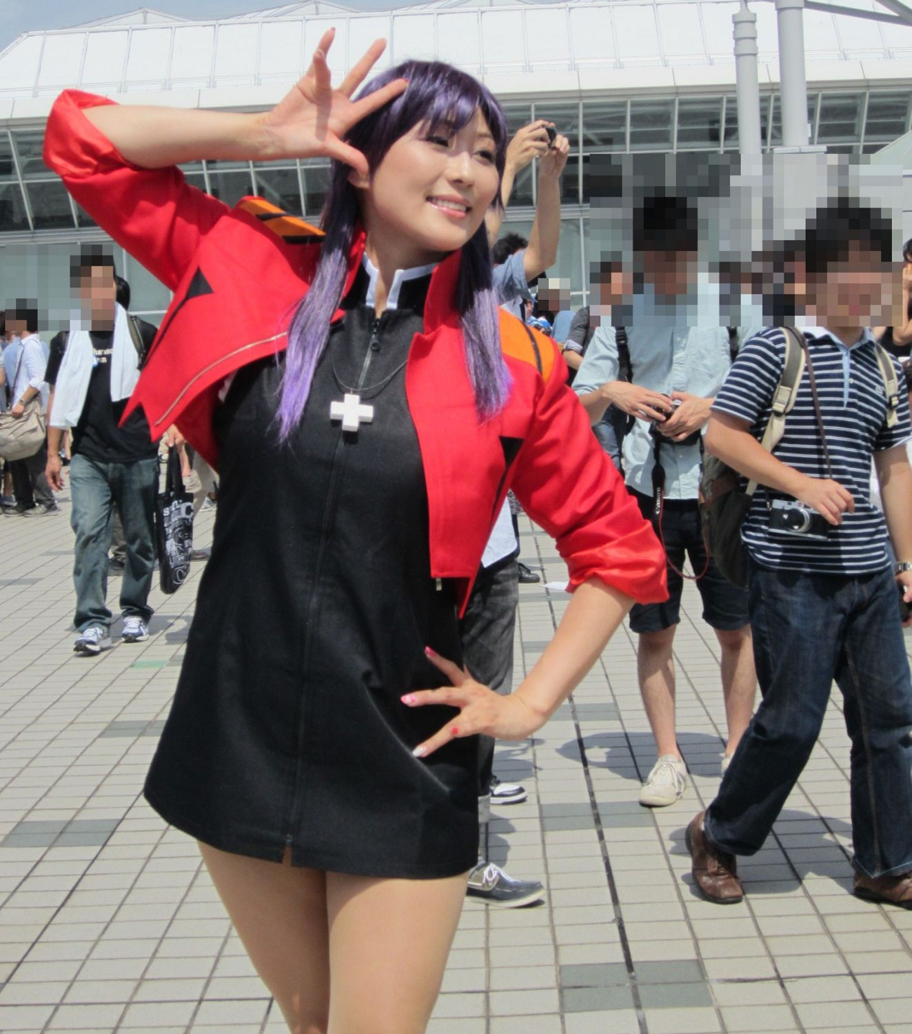 Comic Market 82，《新世紀福音戰士》葛城美里cosplayer。